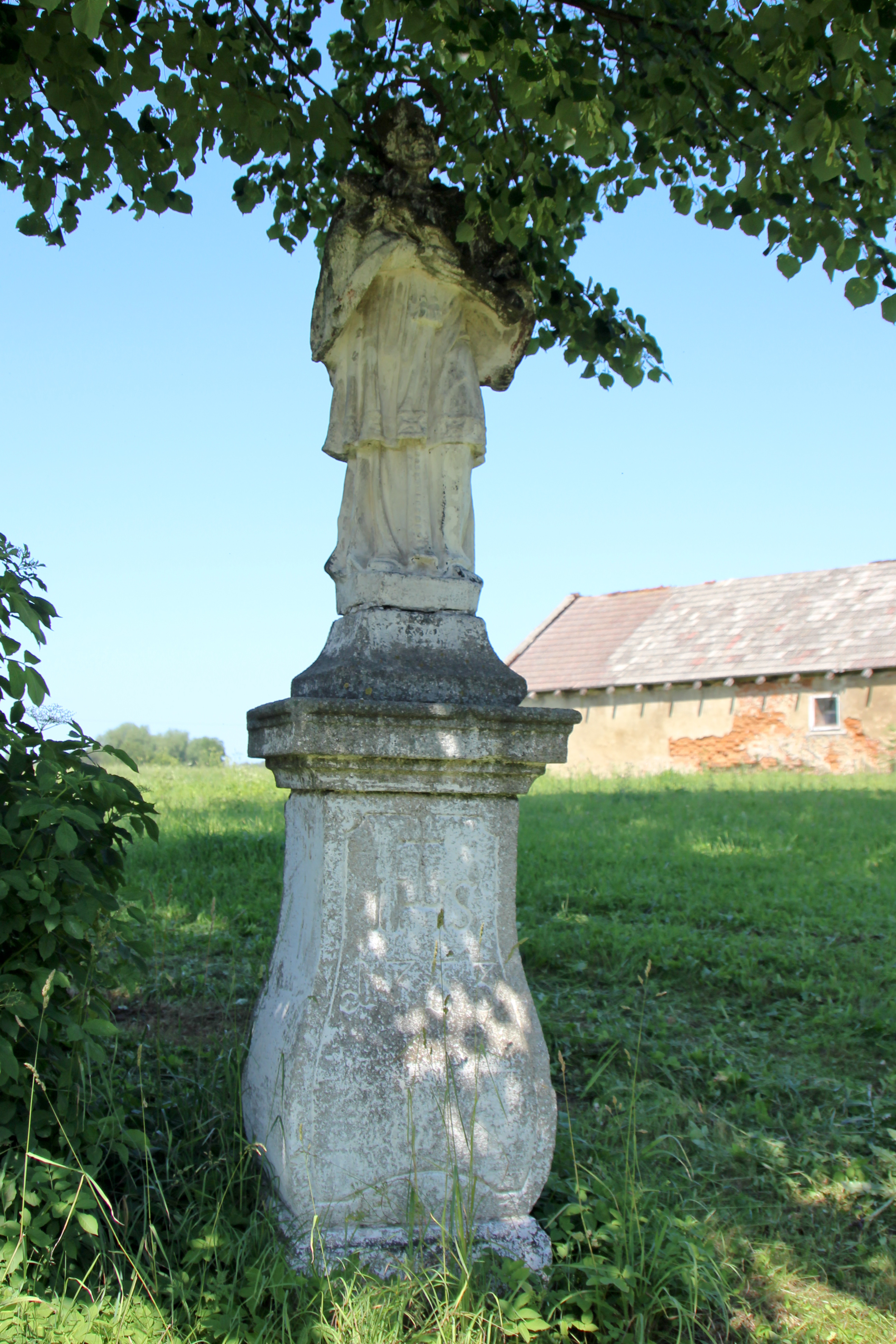 Nowy Las - figura św. Jana Nepomucena.